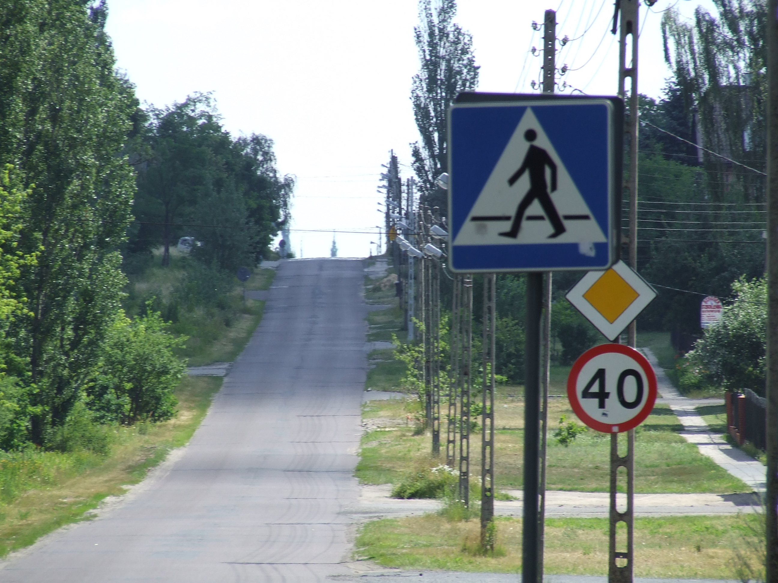 Góra Messa w Łodzi-Rudzie Pab. Autor:Walther, 2006